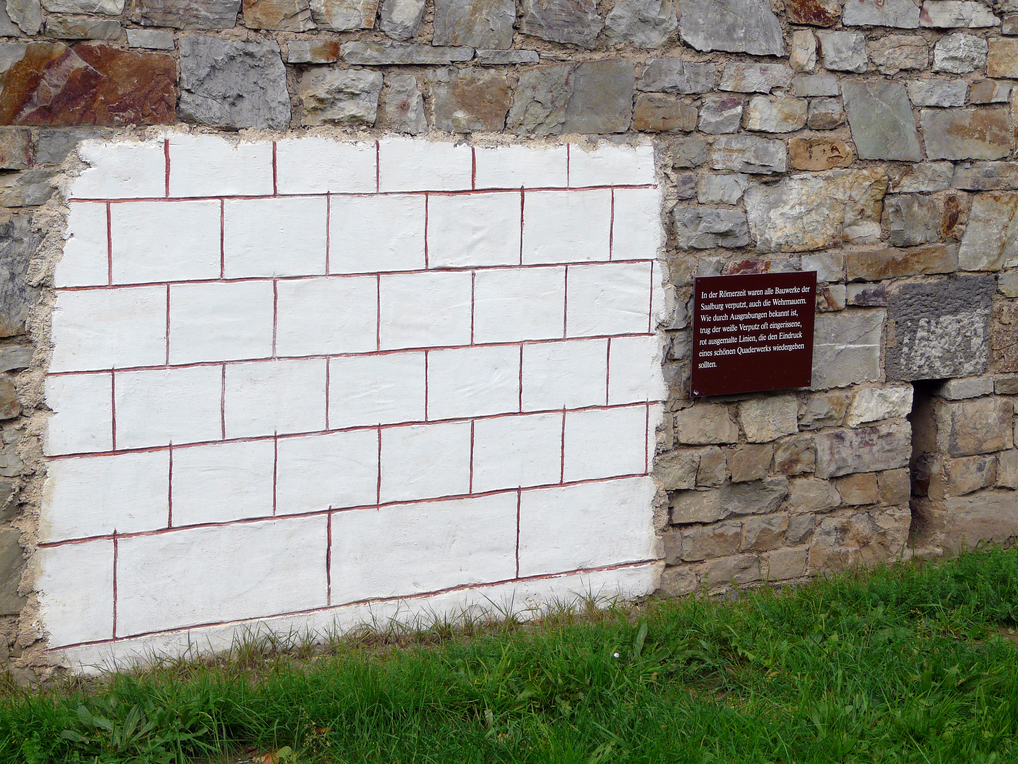 Scheinquaderanstrich auf der Außenmauer des Saalburgkastells